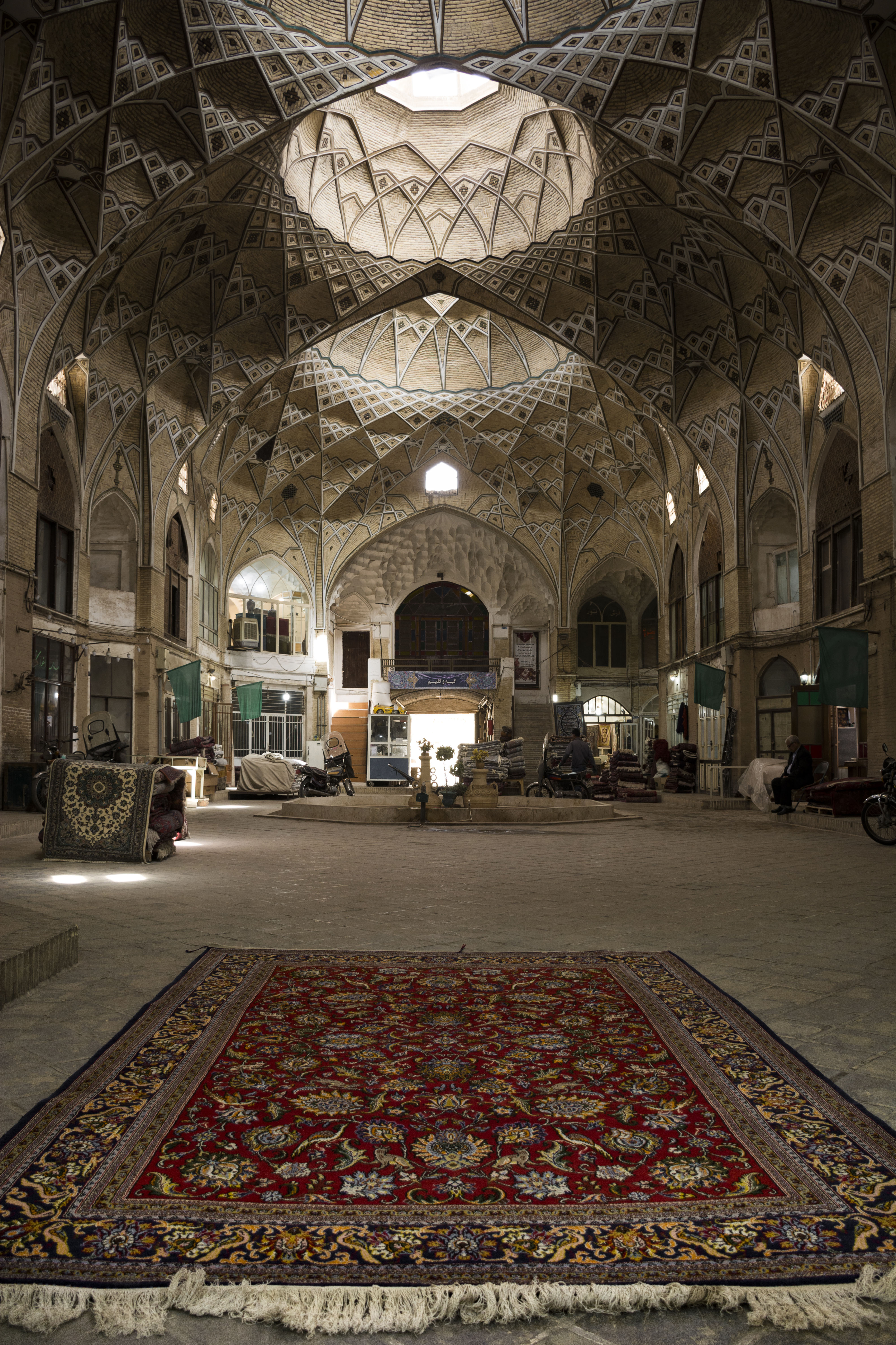 تیمچه بازار قم برای تجارت فرش ساخته شده و امروزه فرش مهمترین محصول صناعی و فروش این تیمچه است به طوری که قم به عنوان پایتخت فرش ابریشمی ایران و جهان شناخته شده است. احداث طاق تیمچه بزرگ با دهانه ۱۶ متر و ارتقاع ۱۵ متر از جمله شاهکارهایی است که با تیمچه امین‌الدوله در کاشان برابری می‌کند. تیمچه بزرگ به طور کلی متشکل است از دو بخش اصلی و تیمچه‌سرا و دارای دو ورودی از راسته بازار نو به تیمچه و یک ورودی از کوچه سیداسماعیل به سرا است.